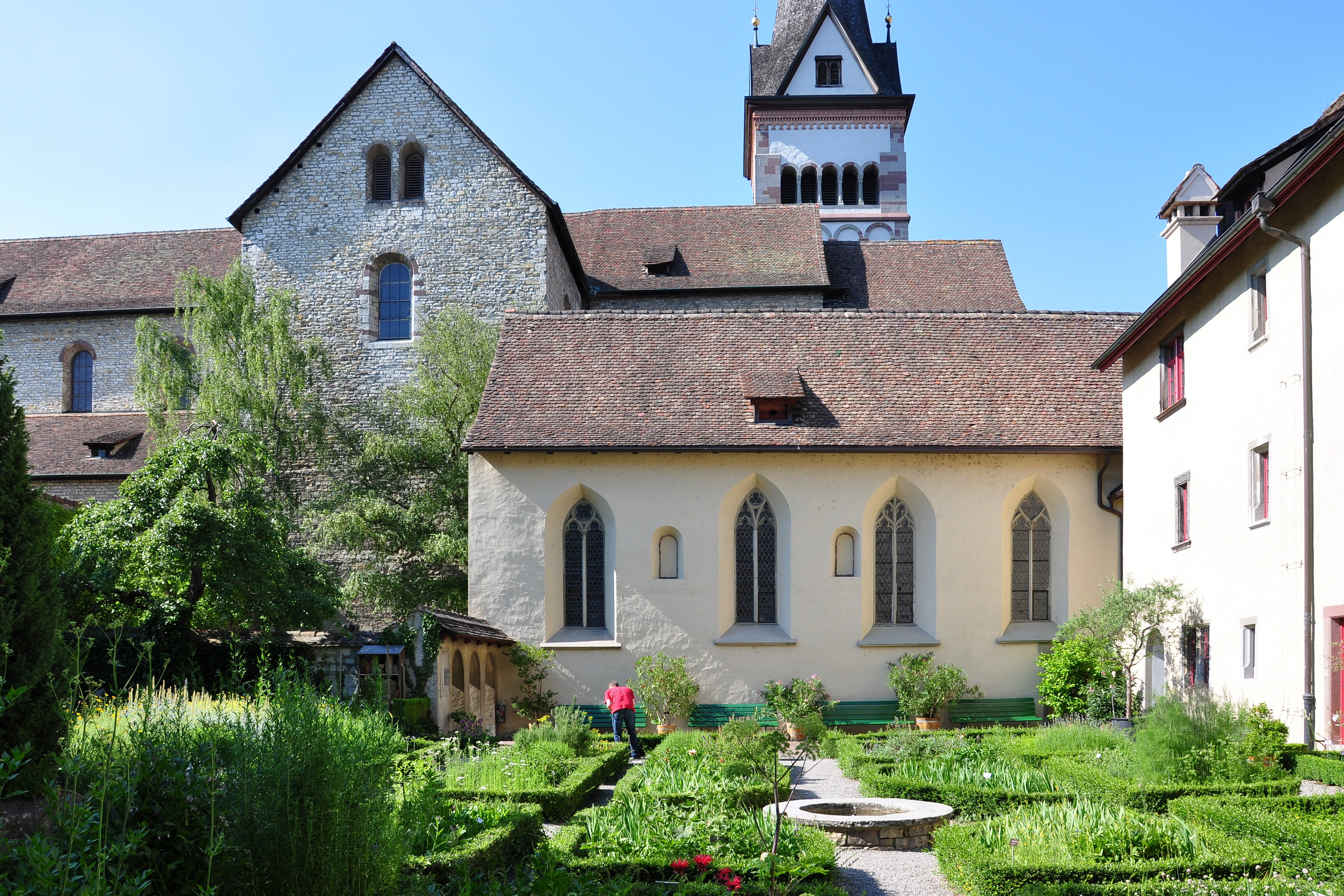 Kloster Allerheiligen in Schaffhausen (Switzerland)